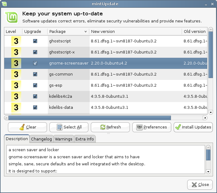 Mintupdate_1.9